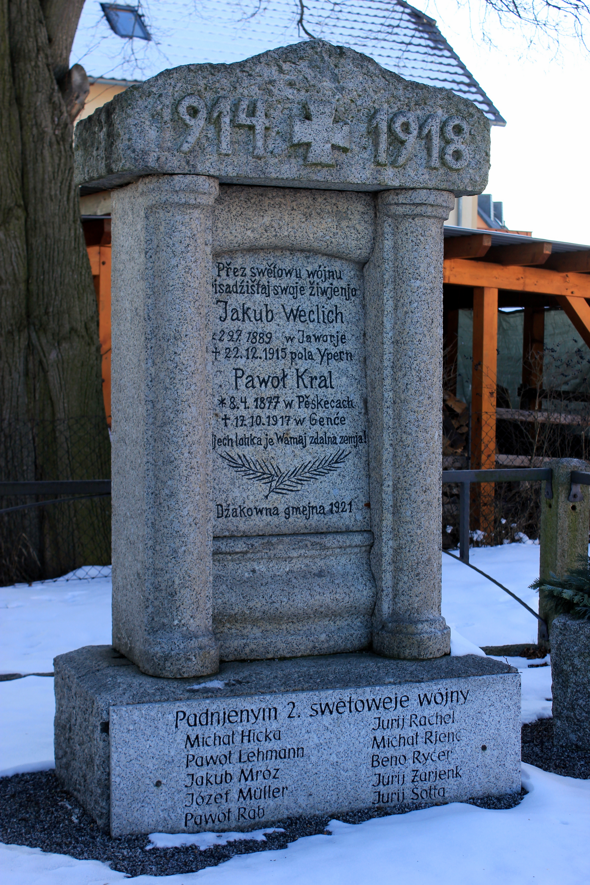 Hornjoserbsce: Wojerski pomnik za padnjenych Prěnjeje swětoweje wójny w Jaworje.